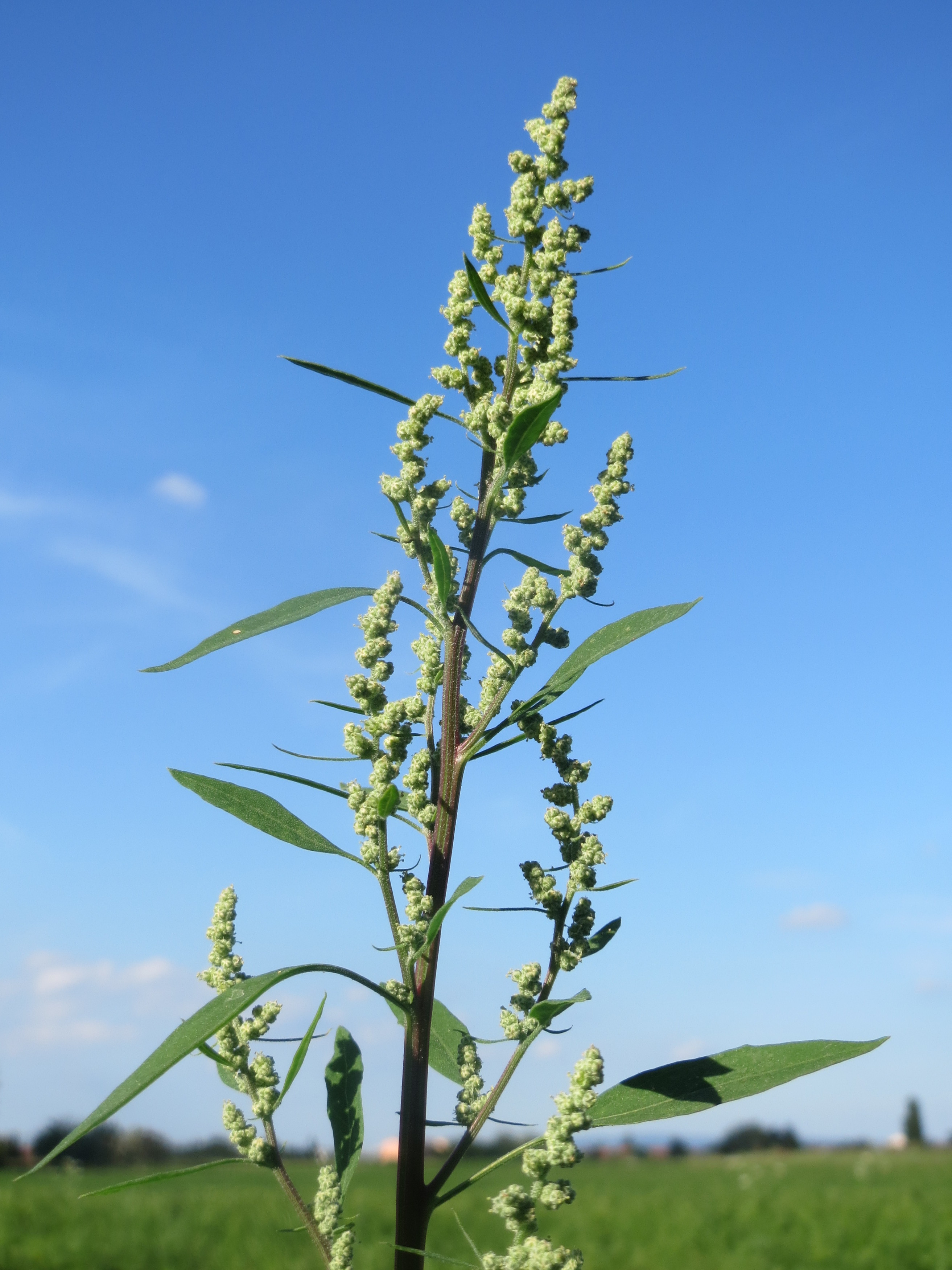 Weißer Gänsefuß (Chenopodium album) am ehemaligen Kraichbachverlauf bei Hockenheim. Der frühere Kraichbachverlauf zwischen Hockenheim und Reilingen läßt sich noch deutlich an Hecken und Galerie-Wäldern ablesen.